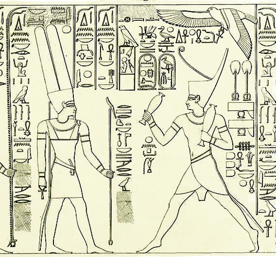 Der König Thutmosis III. bei einem kultischen Lauf während des Sedfestes, Darstellung in der Festhalle (Ach-menu) in Karnak